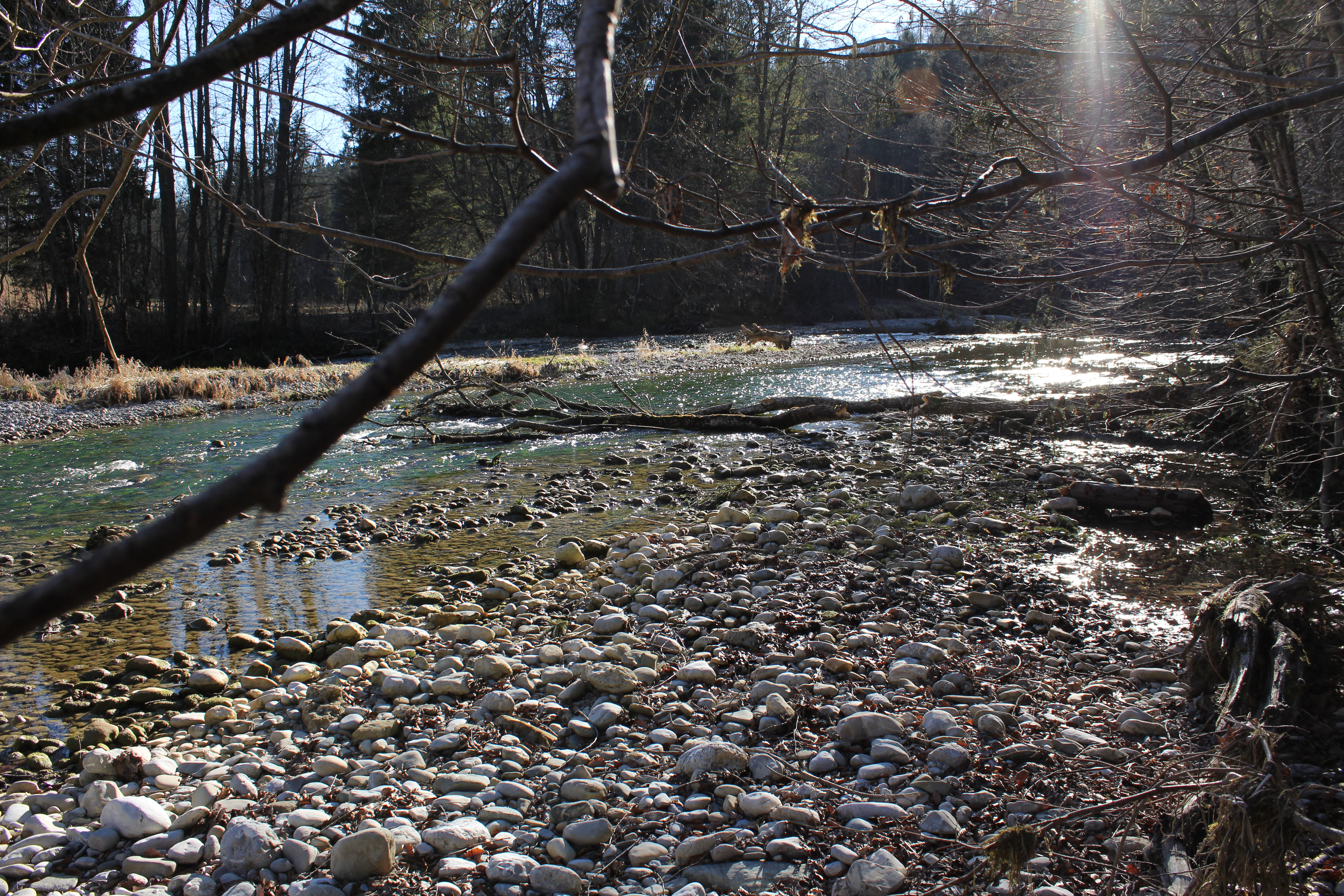 Die Mangfall im FFH-Gebiet Mangfalltal in Oberbayern